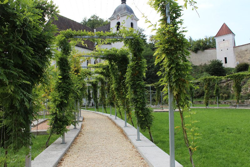 Meditationsgarten d. ehm. Kartause Aggsbach